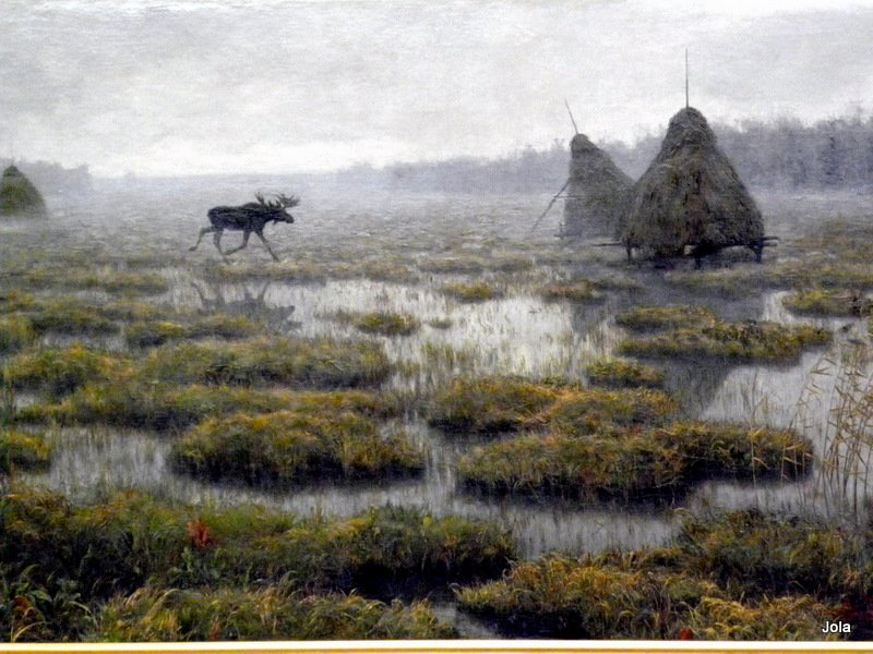 Лось на балоце